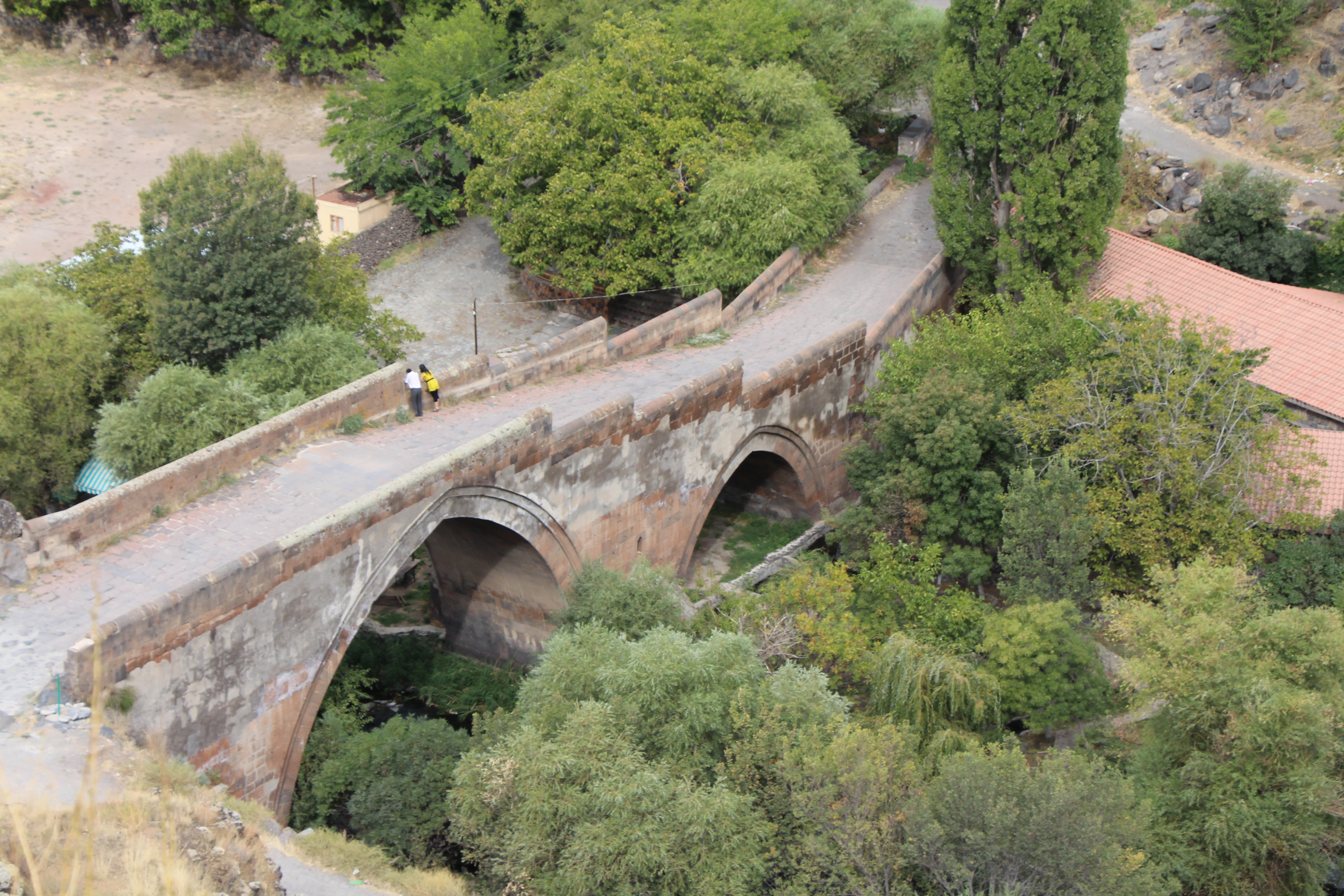 Աշտարակ, Արագածոտնի մարզ, ԿԱՄՈՒՐՋ 10 դ. աե մասում 2.1/20 1/20